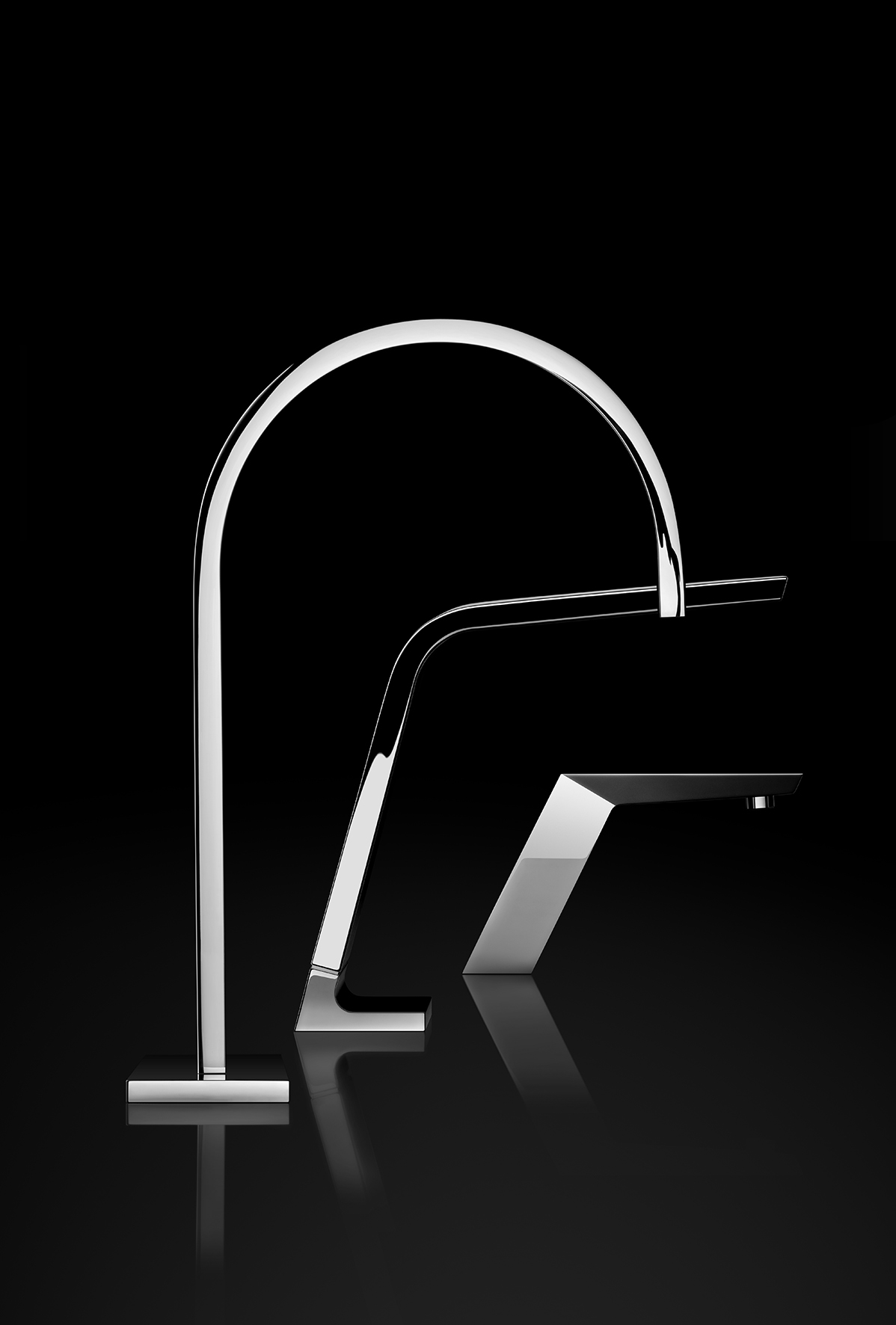 Dornbracht Ikonen